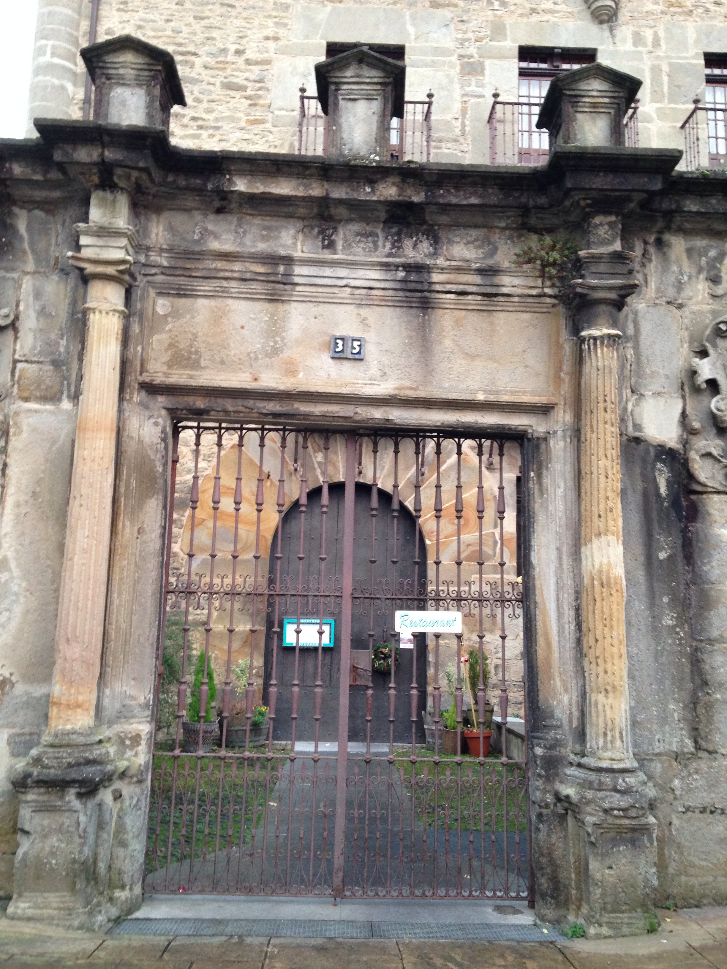 Ozaeta jauregiko sarrera, kanpo atea alboko zutabeekin eta atzean jauregiko bertako ate nagusia, Bergara (Gipuzkoa)